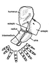 Acantthostega Extremität mit 8 Zehen